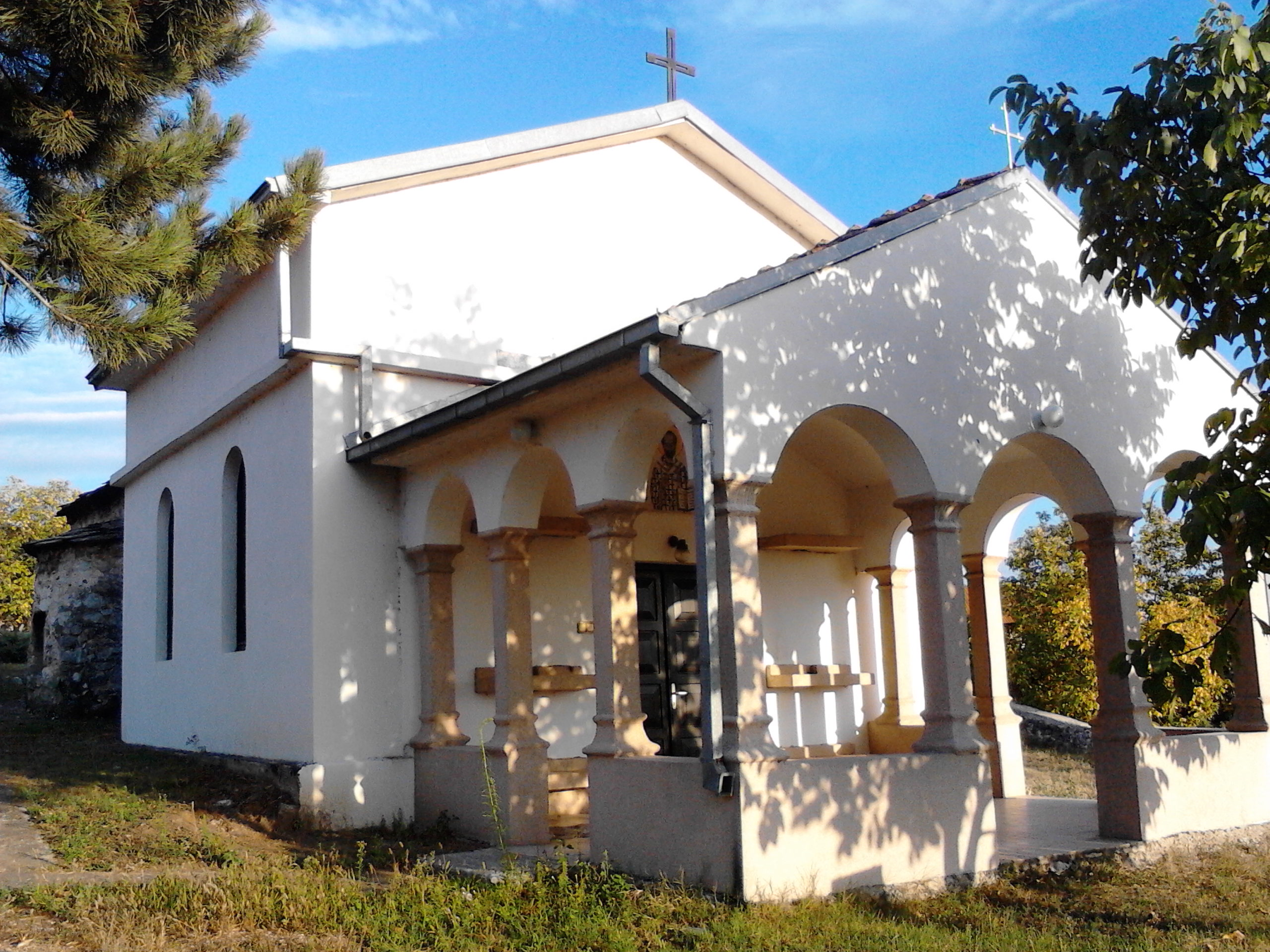 Crkva Svetog Nikole u selu Krupac kod Pirota